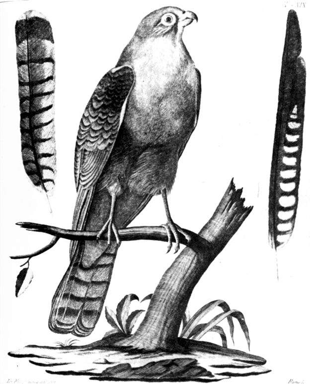 Falke, Bildtafel 19 aus Deliciæ Floræ et Faunæ Insubricæ, 1786